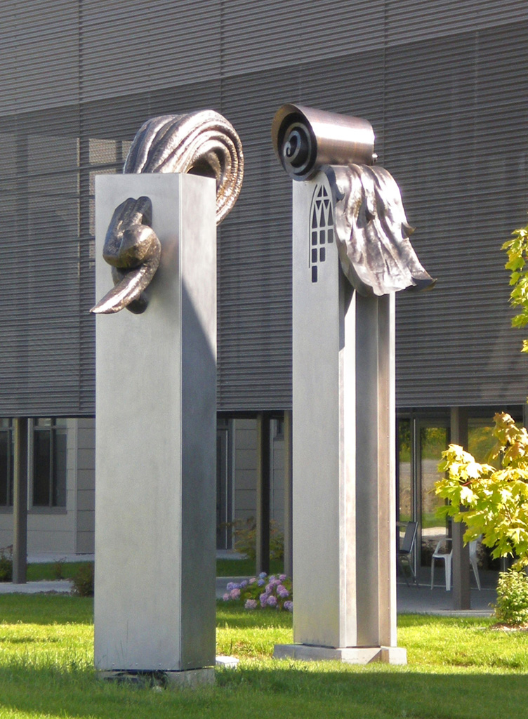 « Il était une fois » ou « Hommage à Marius Barbeau » Pierre Leblanc, 2007-2008 18 pieds h. x 21 pieds x 12 pieds Acier inoxydable, laiton martelé et patiné, lumières Sculpture réalisée pour le CLSC \ CHSLD de la Nouvelle-Beauce à Sainte-Marie (Québec) dans le cadre de la Politique d'intégration des arts à l'architecture.